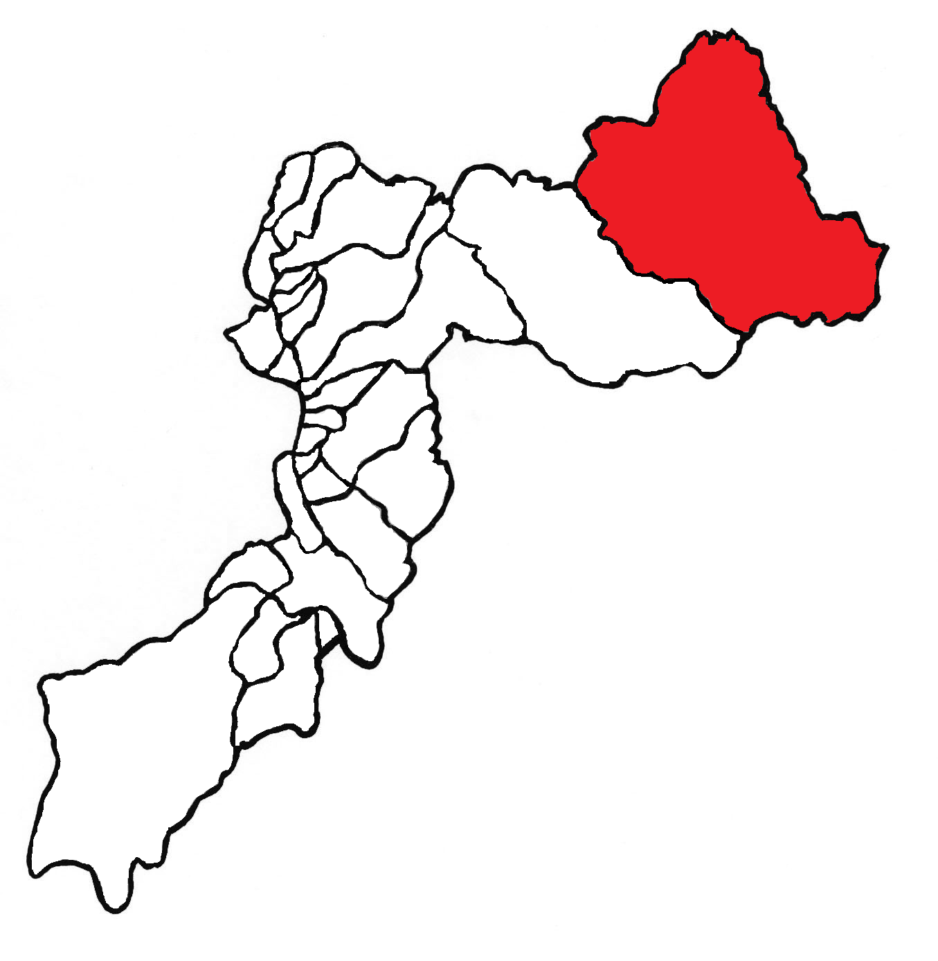 Ubicación del distrito en la provincia de Huancayo, departamento de Junín, Perú